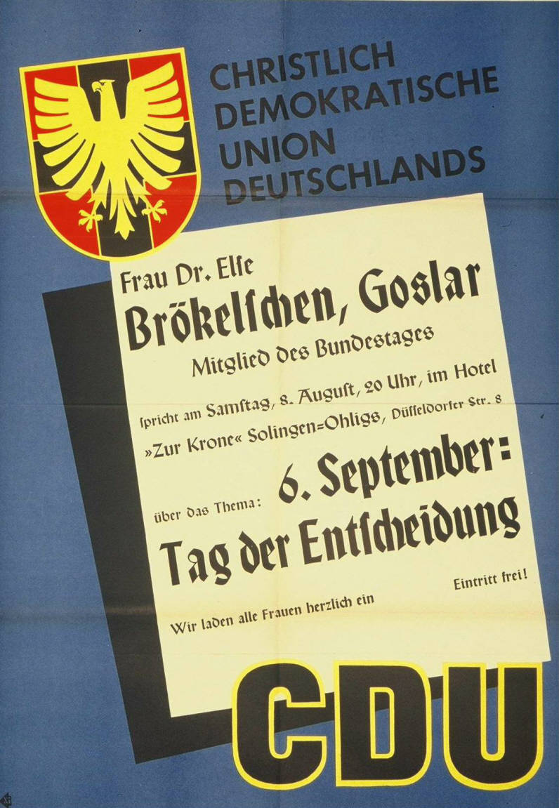 Frau Dr. Else Brökelschen, Goslar MdB spricht ... über das Thema: 6. September: Tag der Entscheidung Plakatart: Ankündigungsplakat Objekt-Signatur: 10-001: 589 Bestand: Plakate zu Bundestagswahlen (10-001) GliederungBestand10-18: Plakate zu Bundestagswahlen (10-001) » Die 2. Bundestagswahl am 6. September 1953 » CDU » Ankündigungsplakate Lizenz: KAS/ACDP 10-001: 589 CC-BY-SA 3.0 DE